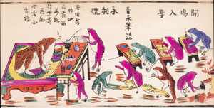 L'école des grenouilles (Lão oa giảng độc), imagérie populaire vietnamienne